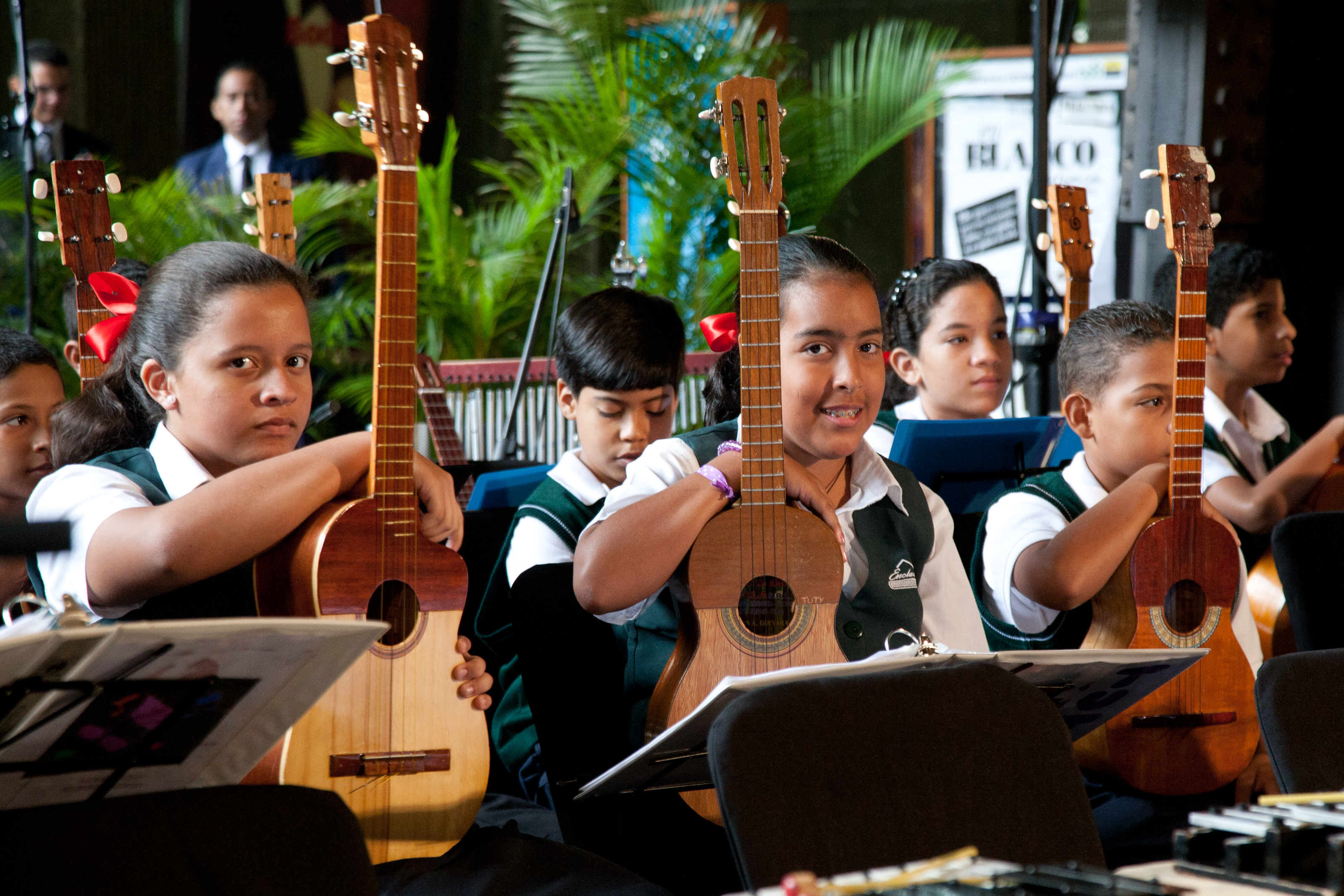 Fundación Enclave, más de 50.000 niños beneficiados por el programa “Música para Todos”